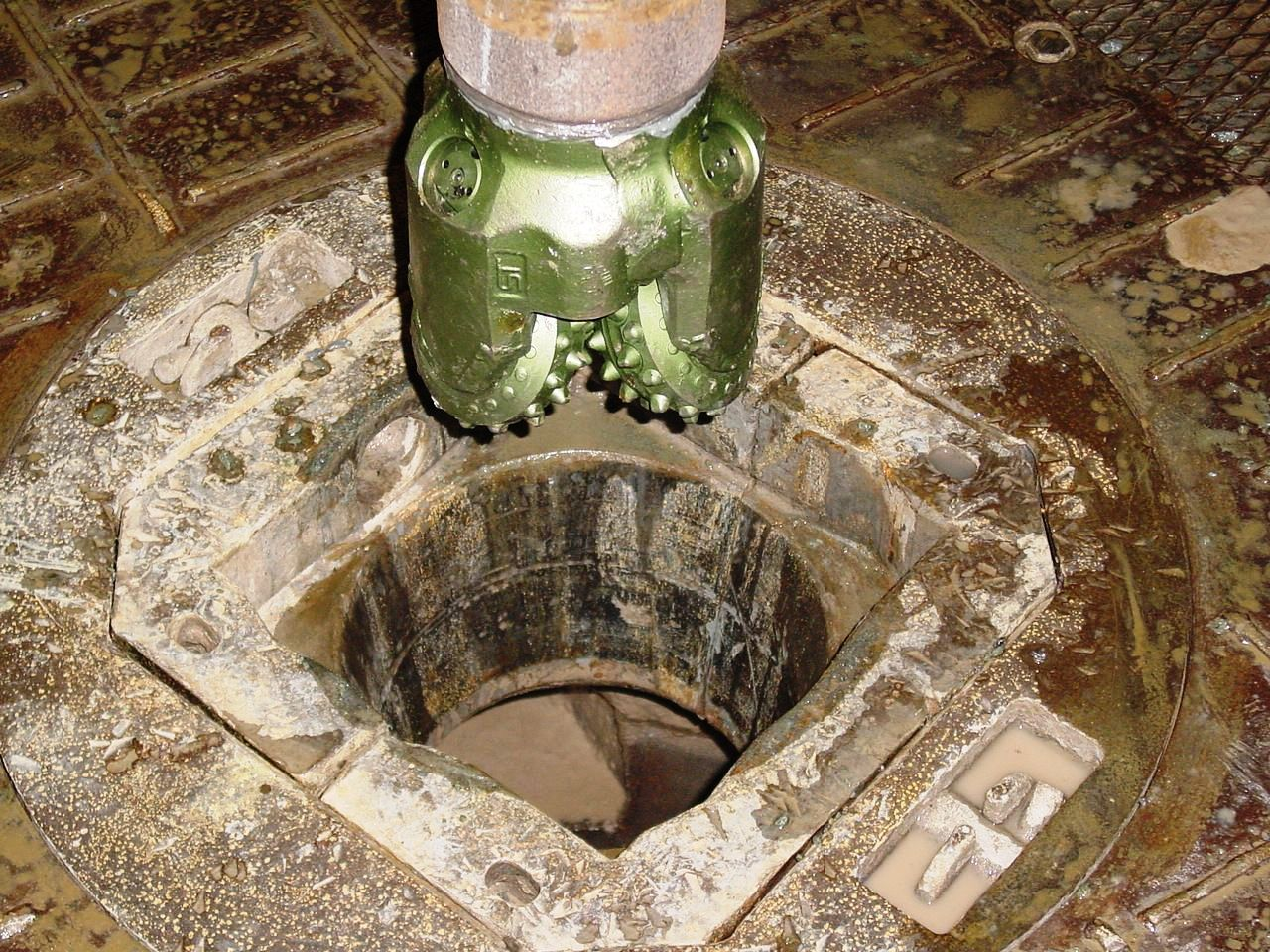 Ein Rollenmeissel beim Einbau in das Bohrloch